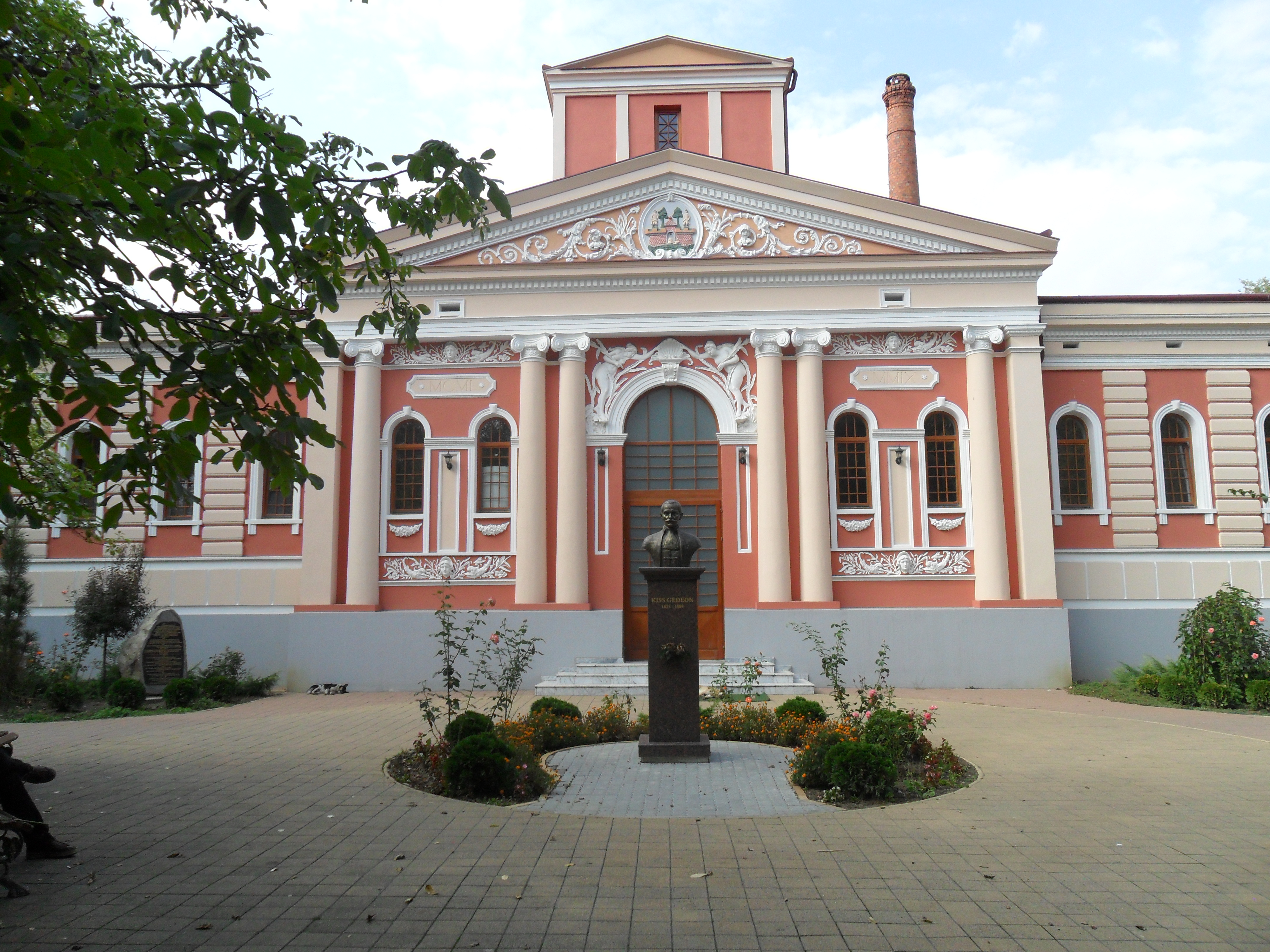 Baia comunală